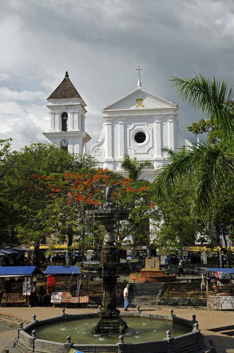 catedral Basilica metropolitana